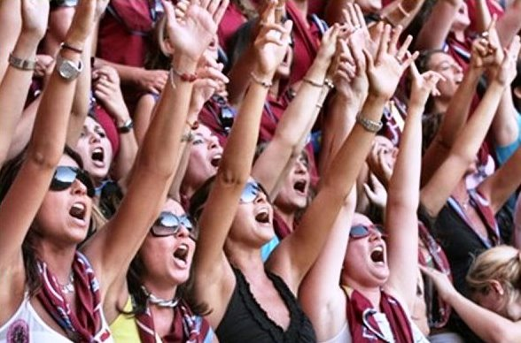 Contrada girls singing